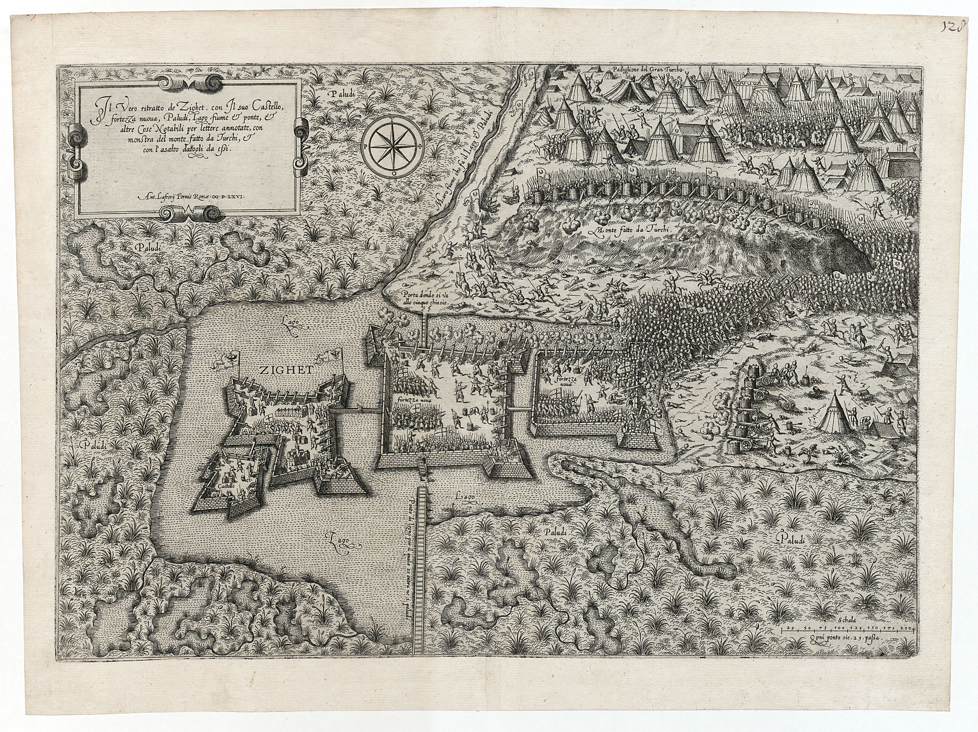 Lafrery, Antonio: Il vero ritratto de Zighet con il suo castello ...; Radierung, 1566